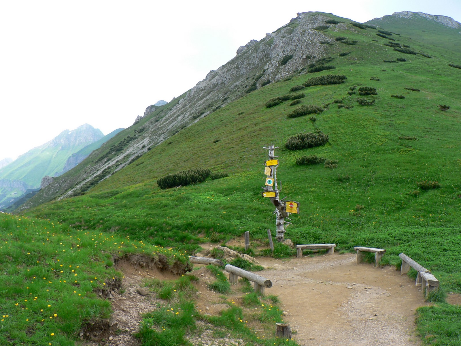 Przełęcz pod Kopą w Tatrach Słowackich